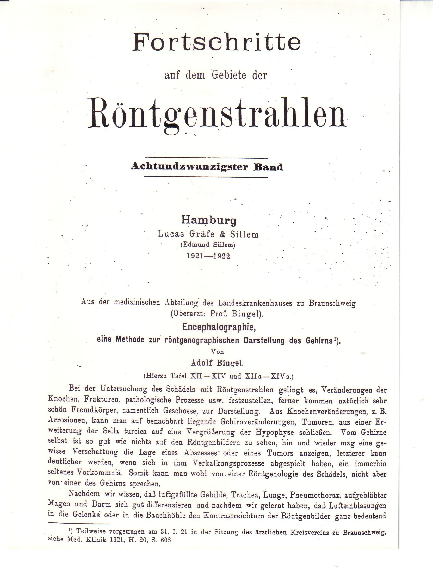 Titelblatt von Adolf Bingels Publikation zur Pneumenzephalographie